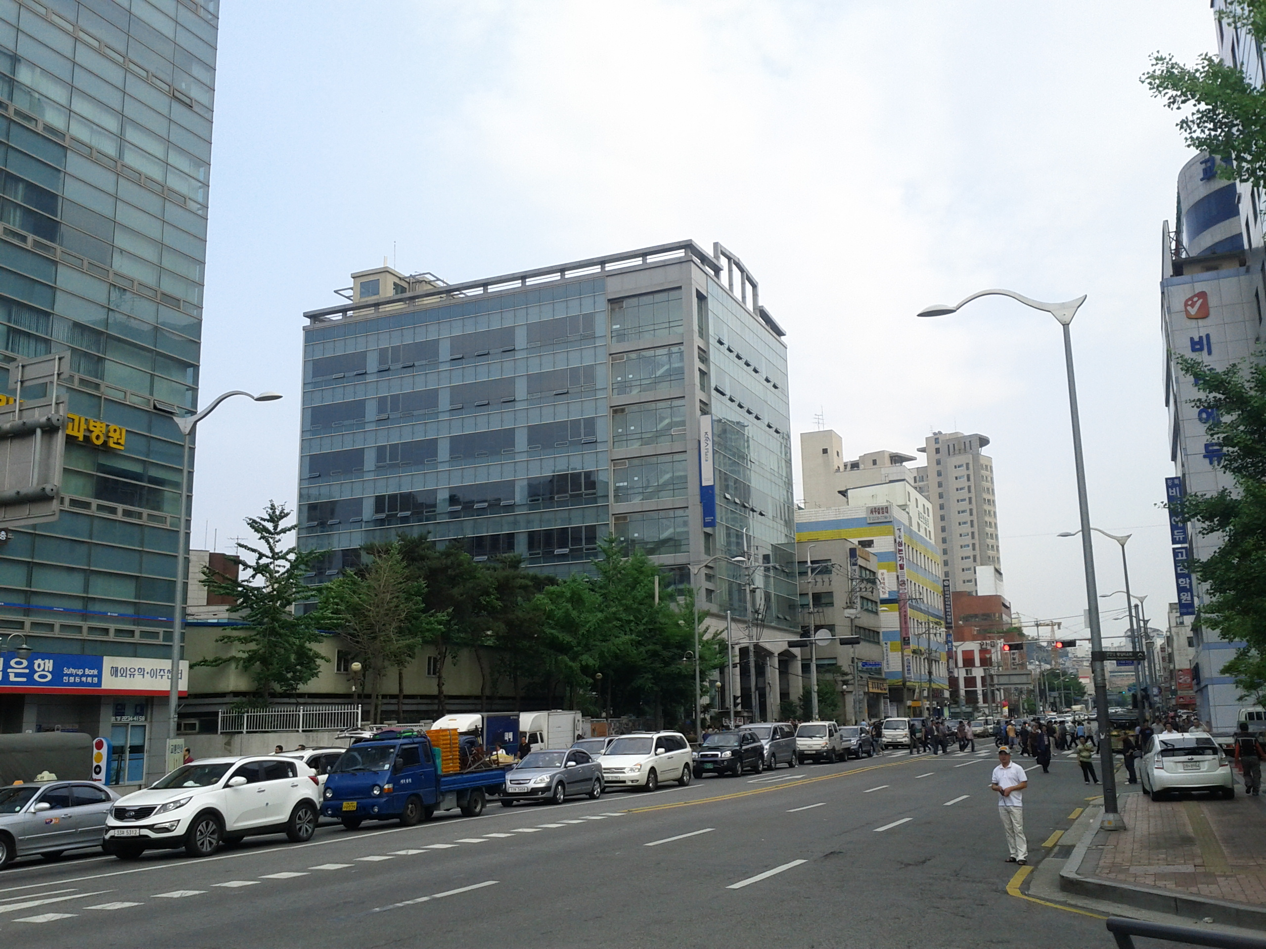 한국마사회 신설동 지점(KRA 플라자)